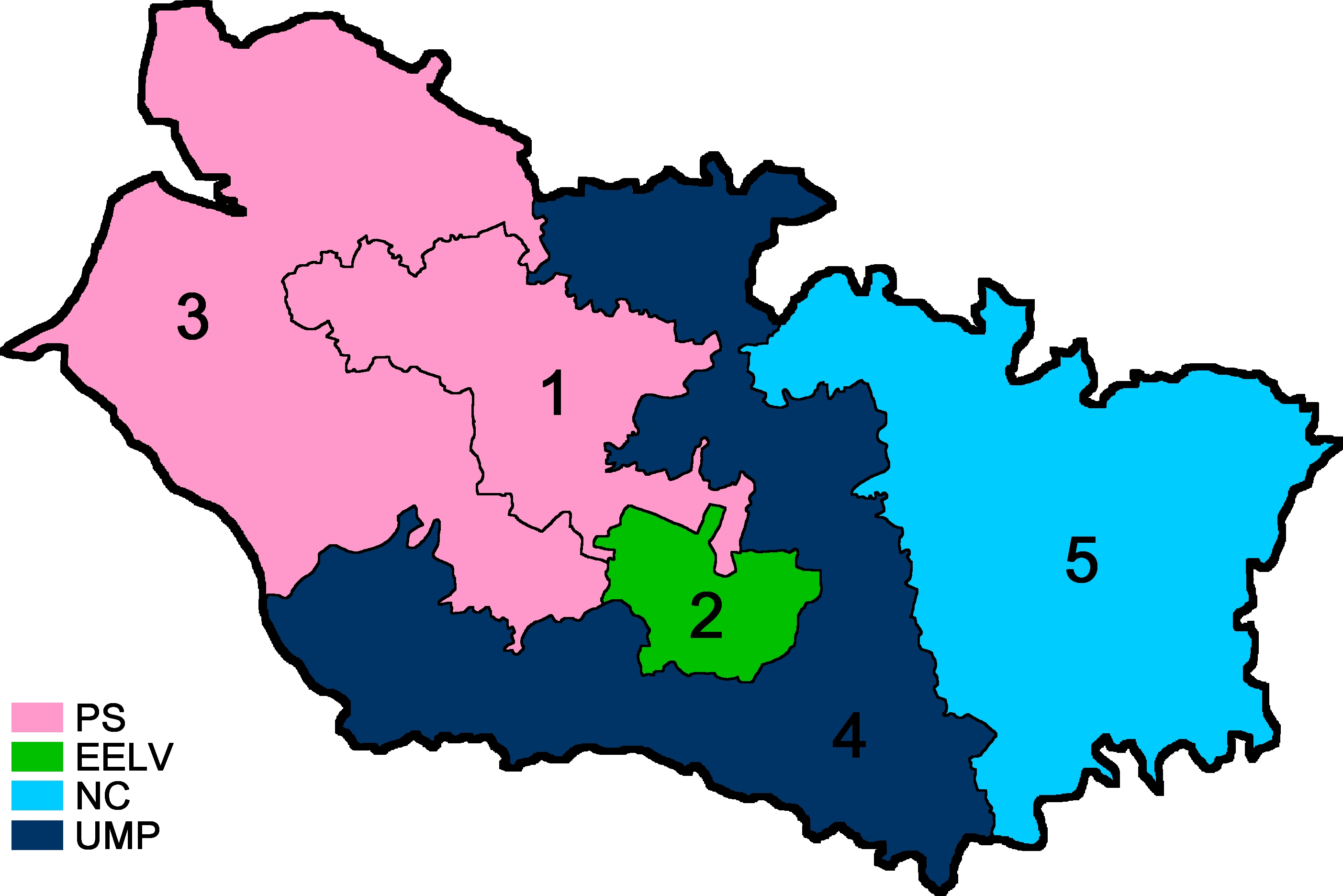 Députés depuis 2012